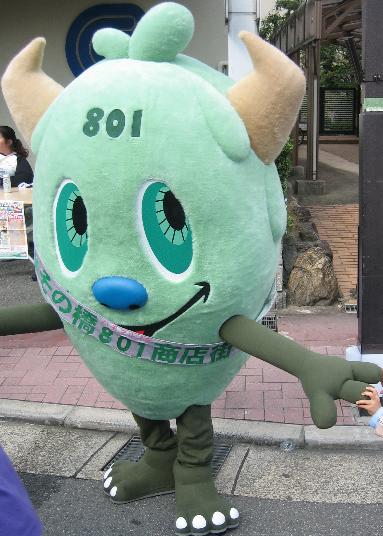 『みそのばしフェスティバル2010withゆるキャラ(R)』にて